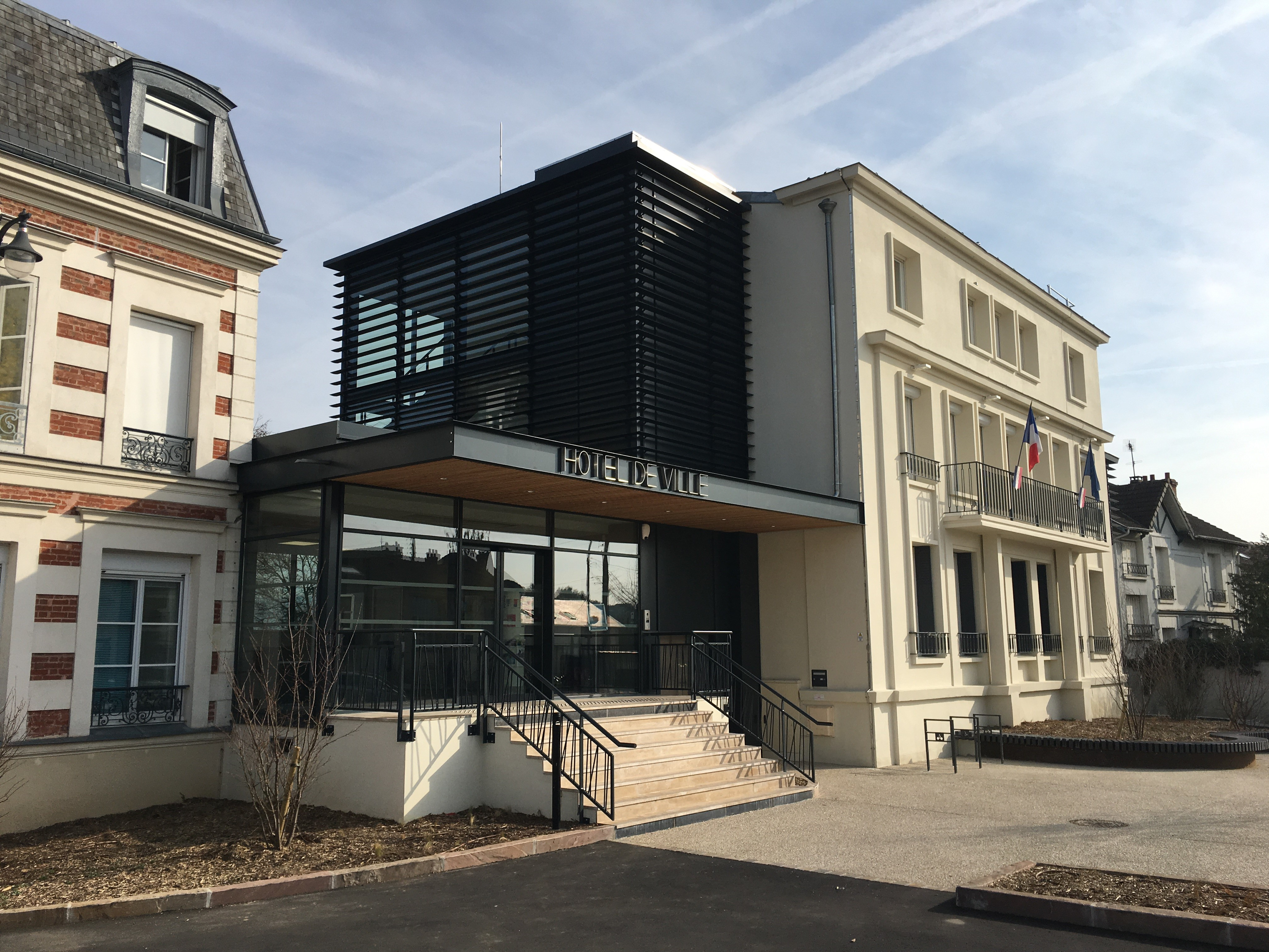 Marie rénovée de la ville de Verneuil-sur-Seine.